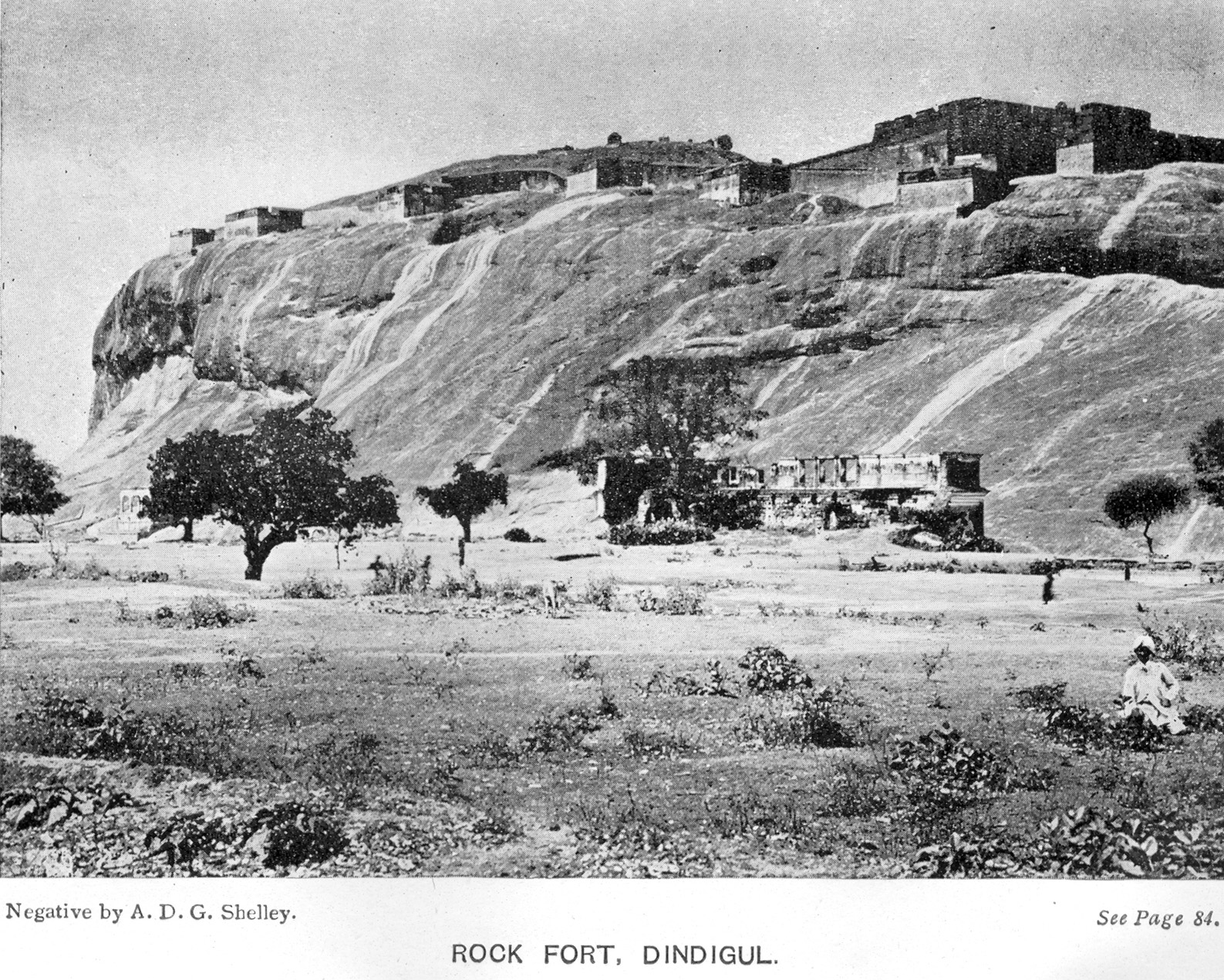 Dindigul